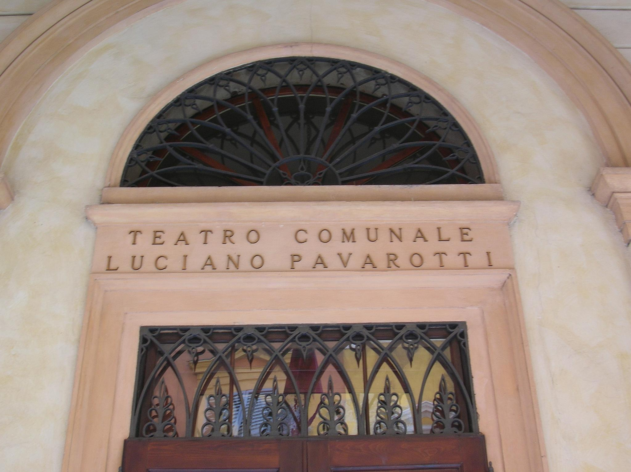 Modena